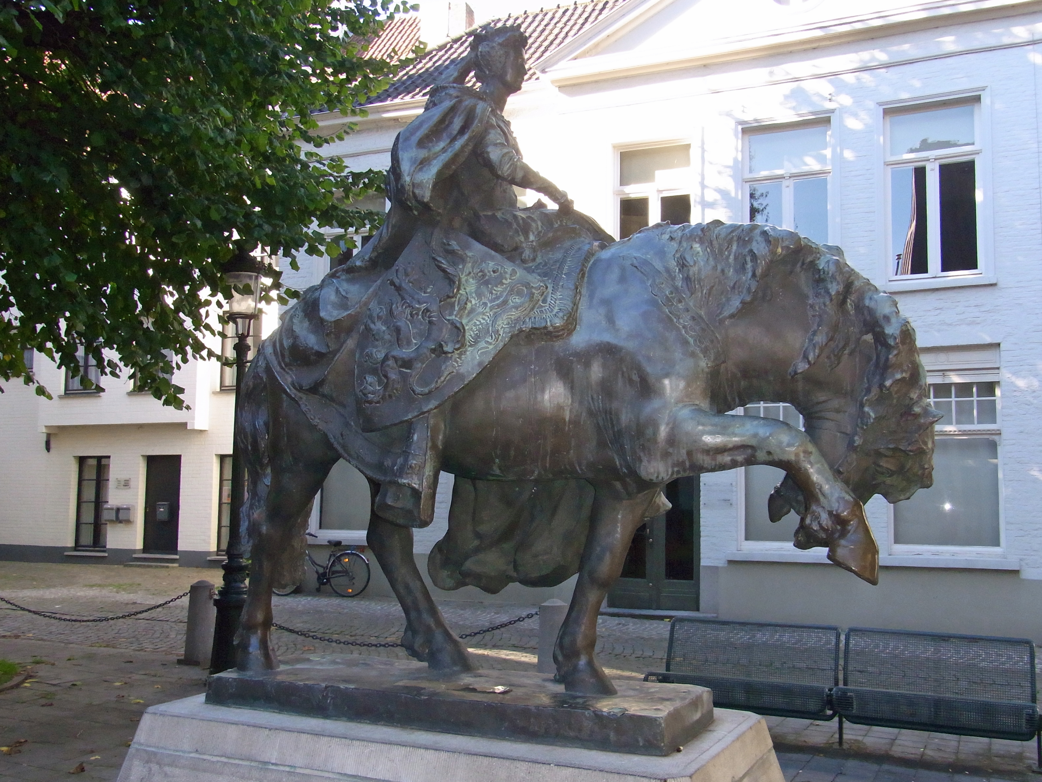 Brügge: Muntplein